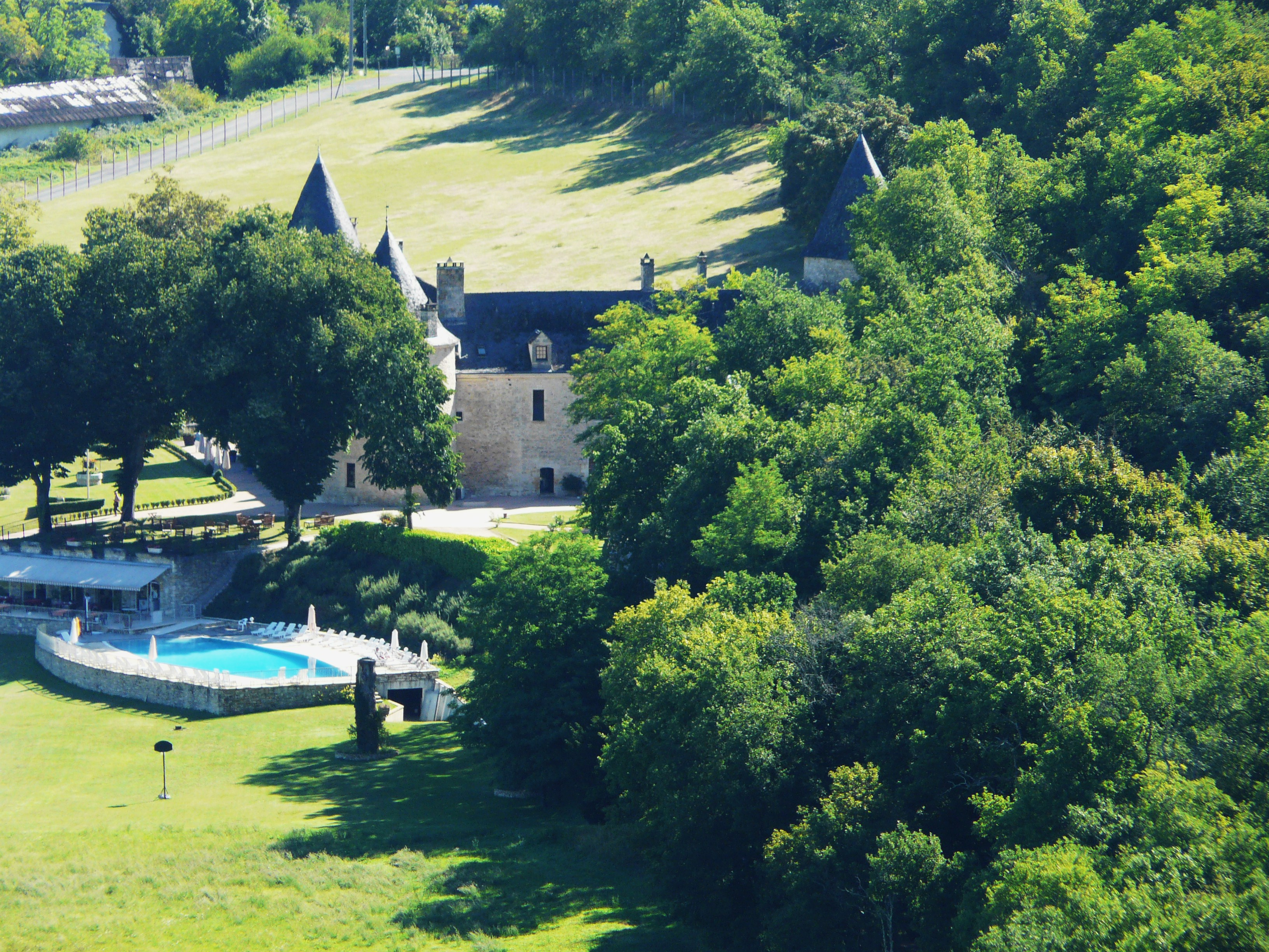 Le château de la Fleunie (vu depuis le coteau de l'Escaleyrou), Condat-sur-Vézère, Dordogne, France